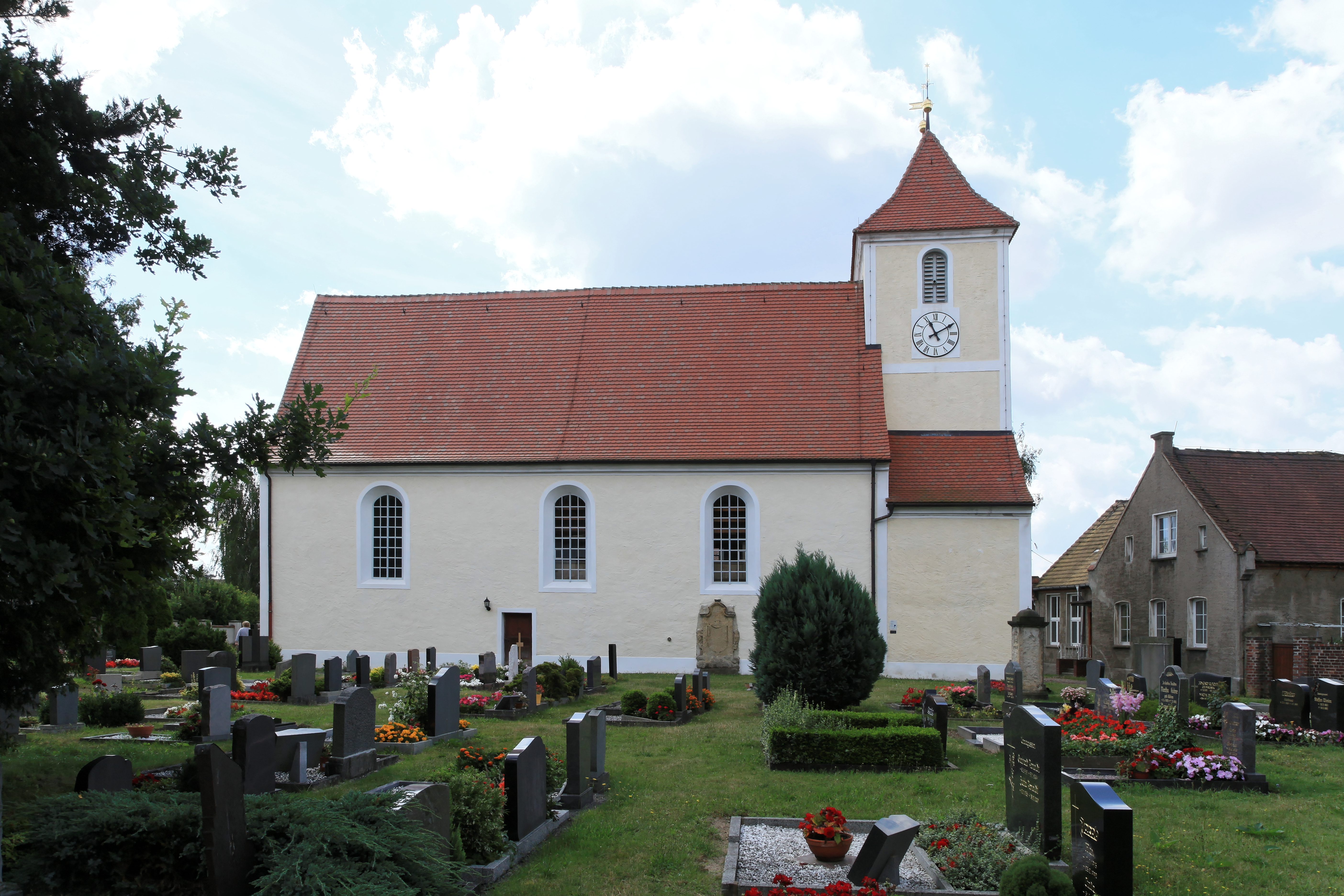 Friedhof und Dorfkirche Weltewitz, Lindenplatz in Weltewitz, Jesewitz